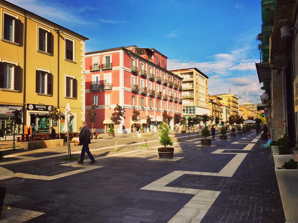 Scorcio Corso Mazzini a Cosenza